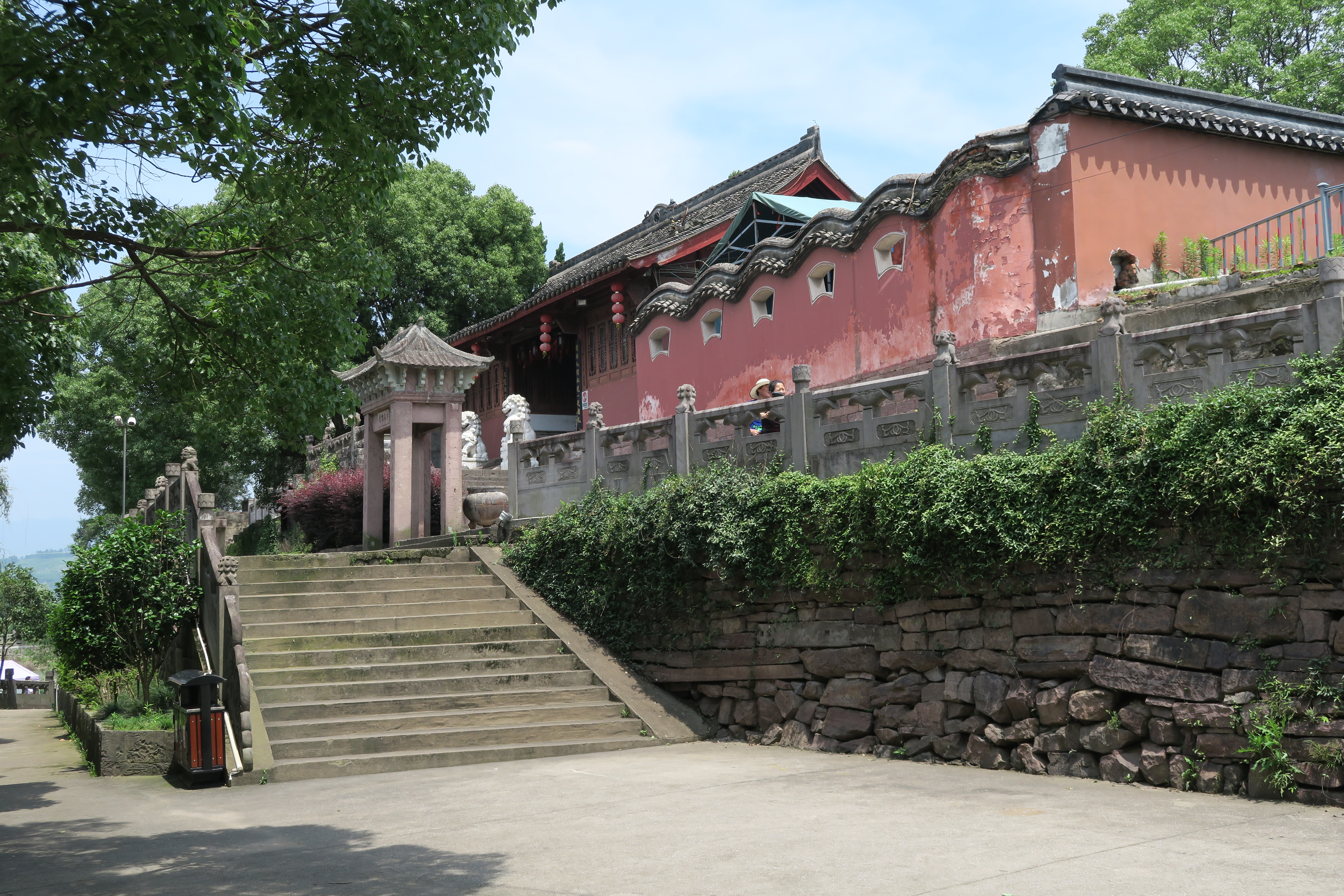 宁波鄞江它山遗德庙